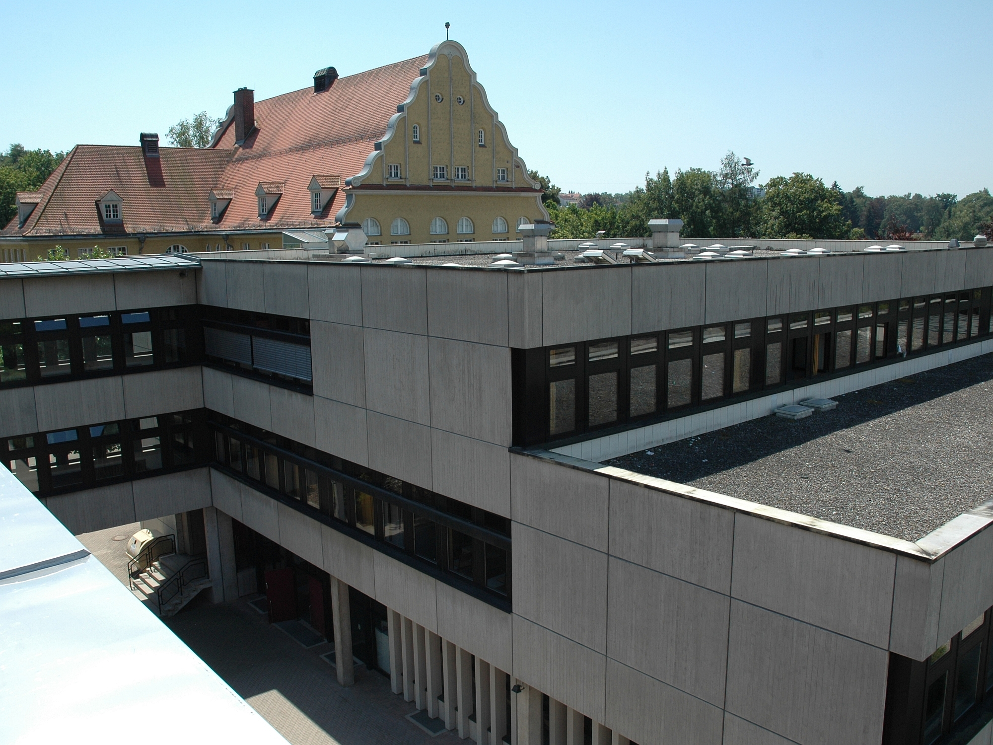 Luitpold-Gymnasium Wasserburg am Inn - Bayern - Deutschland